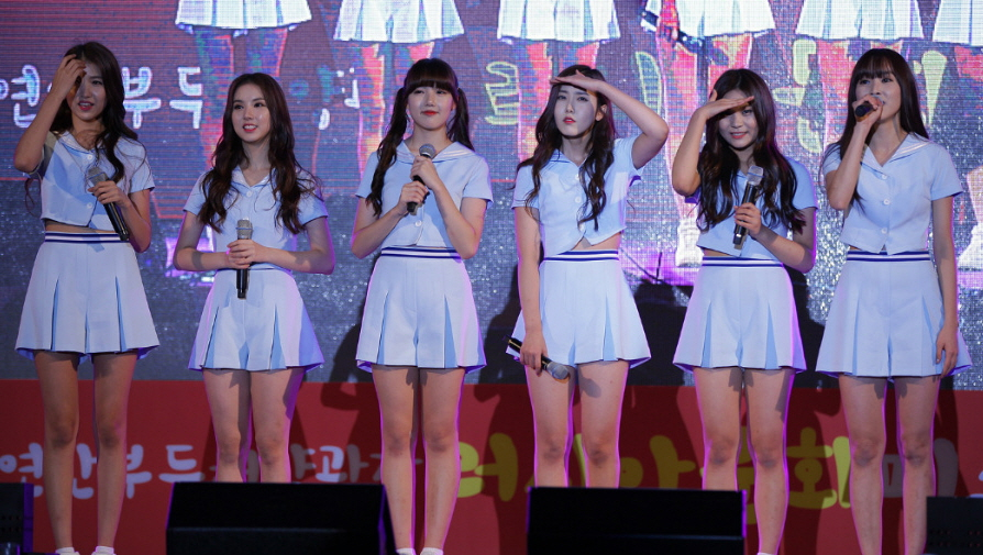 여자친구(GFRIEND) 러시아 문화 페스티벌 인천 연안부두 해양광장